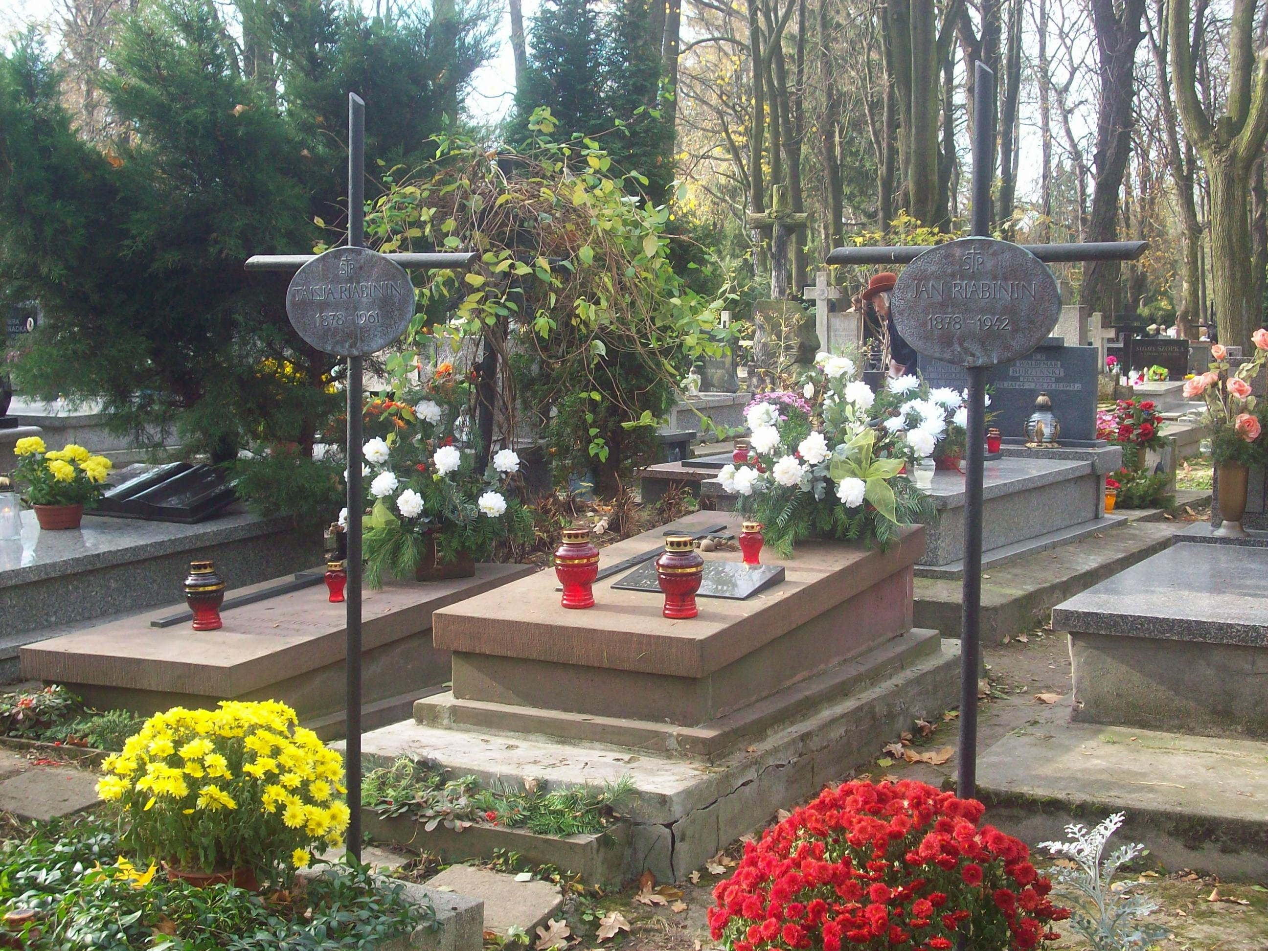 Grób Jana Riabinina. Cmentarz prawosławny przy ulicy Lipowej w Lublinie.